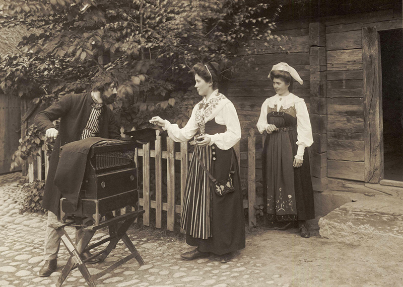 Depicted place: Stockholm, Stockholm, Stockholm, Skansen, Djurgården (Sverige (SE))